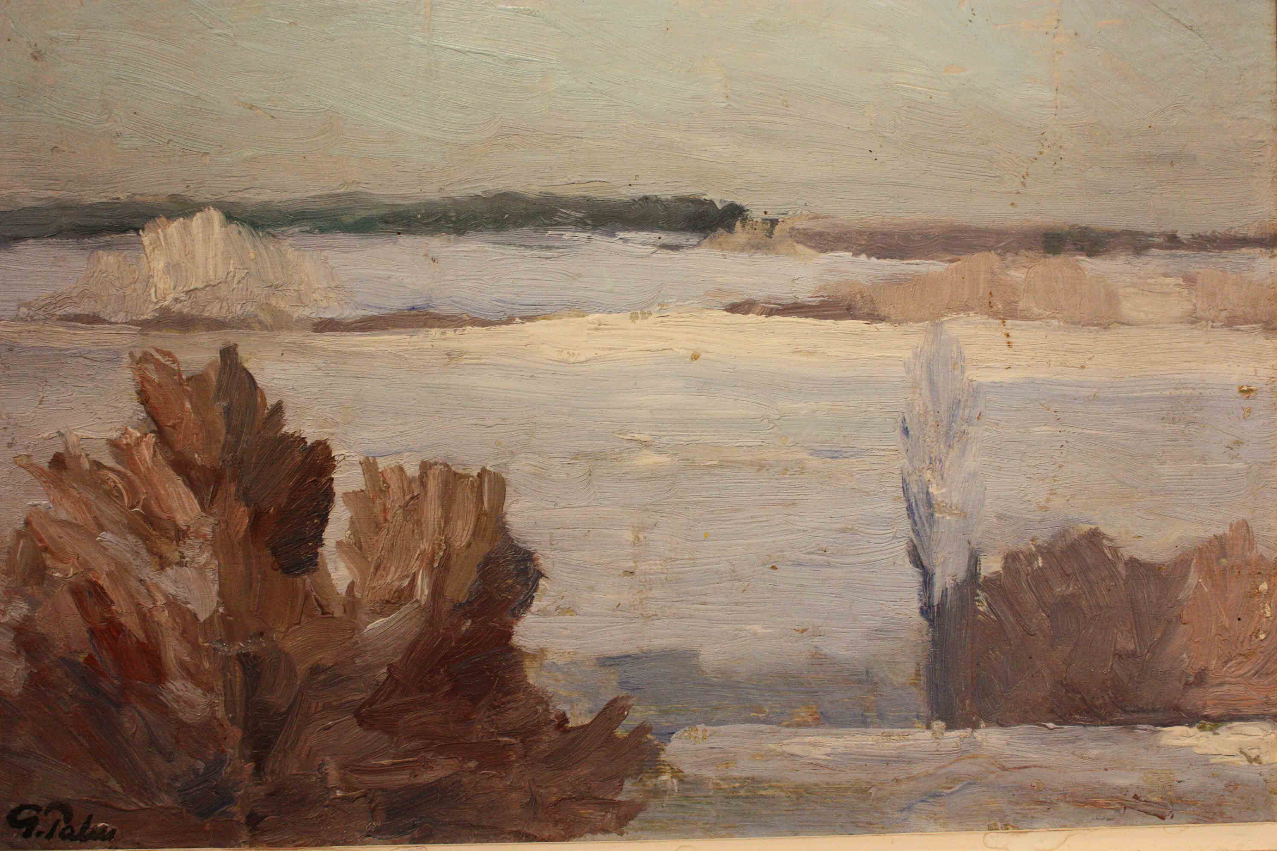 Gösta Palm, måleri, Landskap Öland 1940